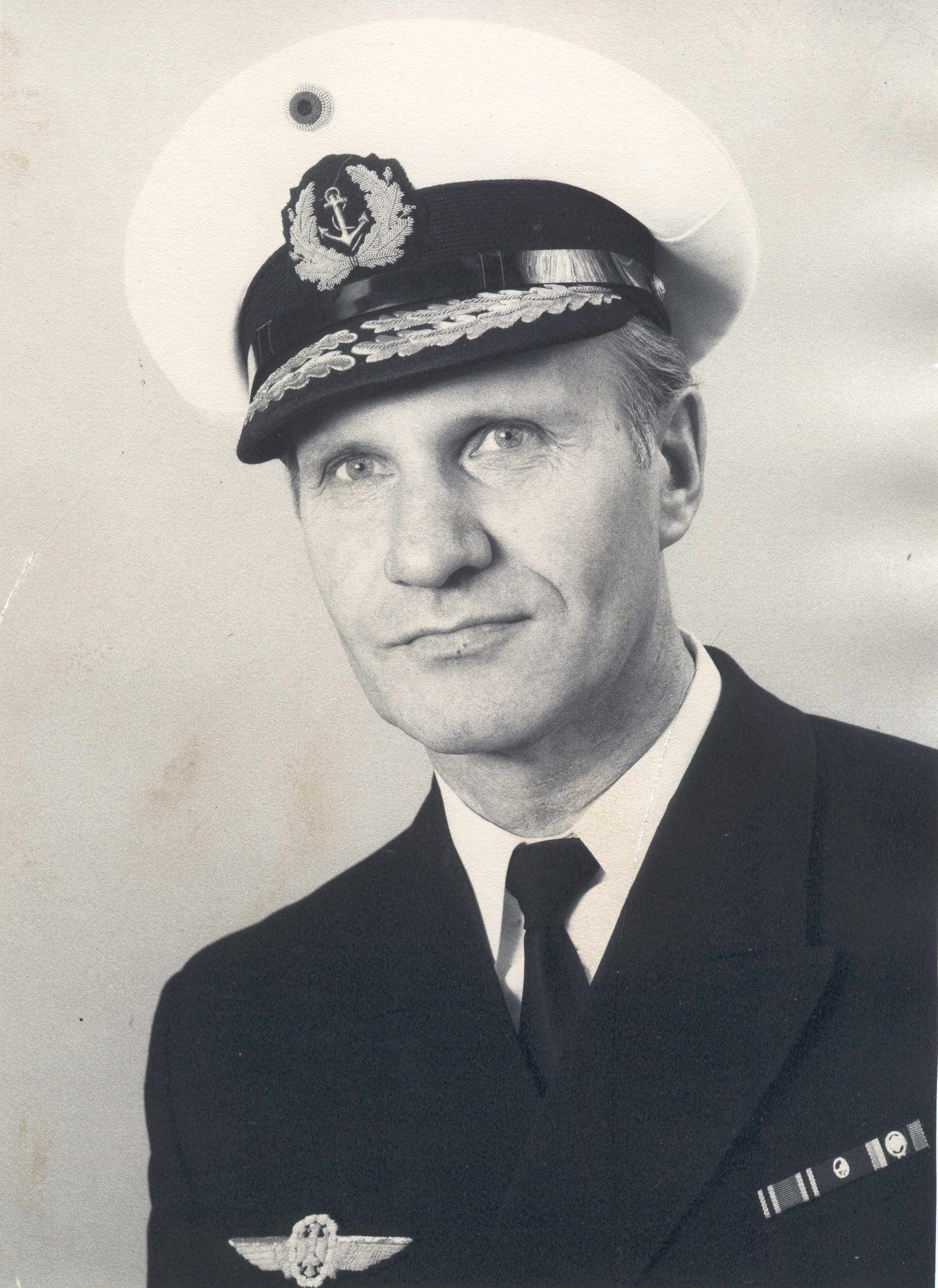 Porträtfotografie von Flottillenadmiral Helmut Kampe